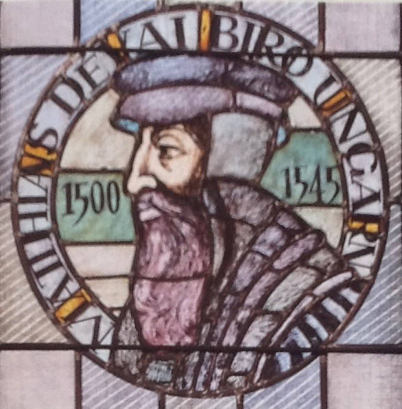 Reformator Ungarns